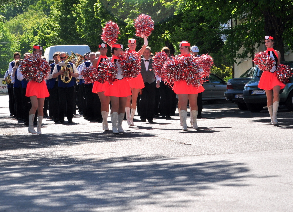 Przemarsz orkiestry dętej z mażoretkami ( Miejska Orkiestra Dęta z Koprzywnicy - Czechy )